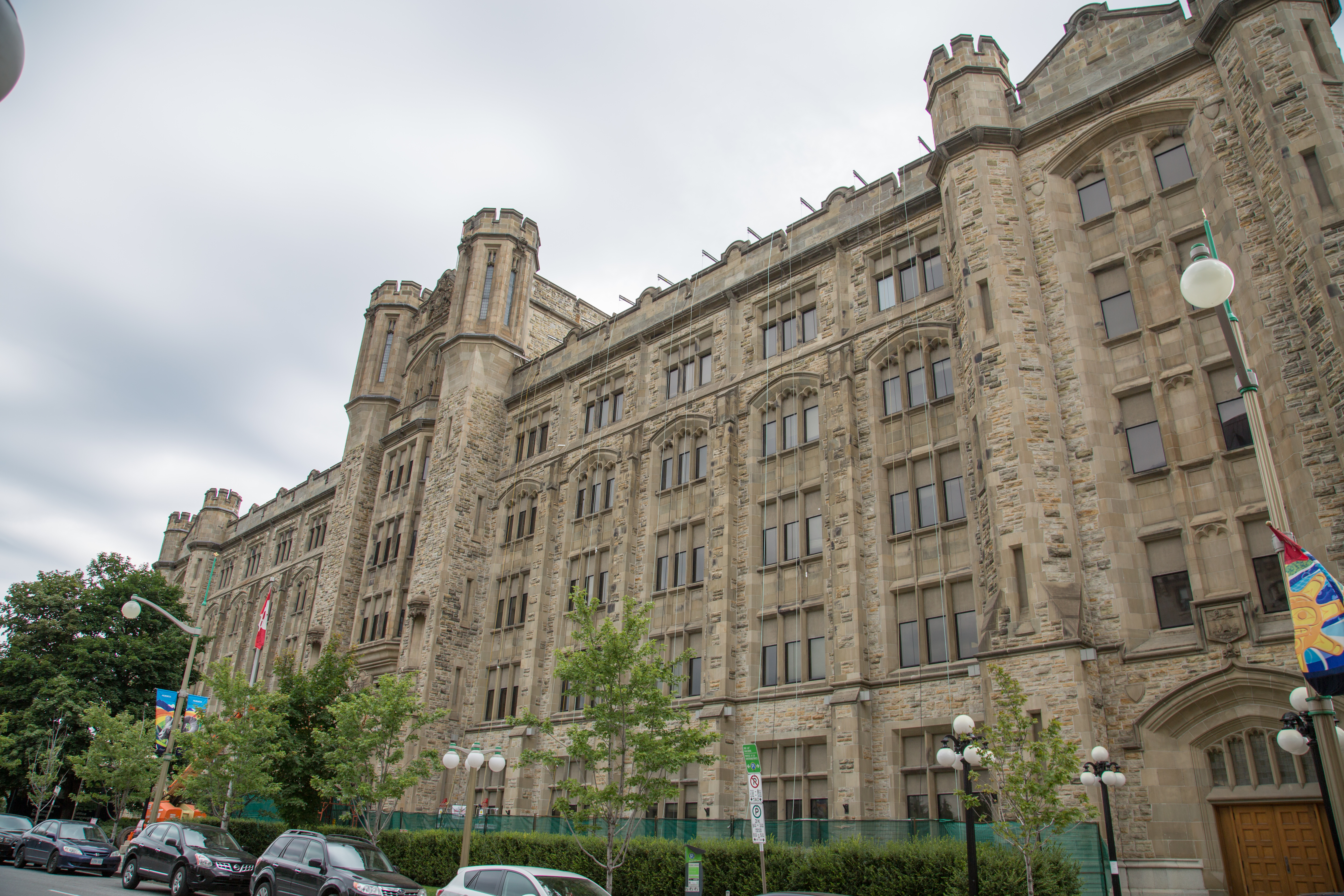 Ottawa